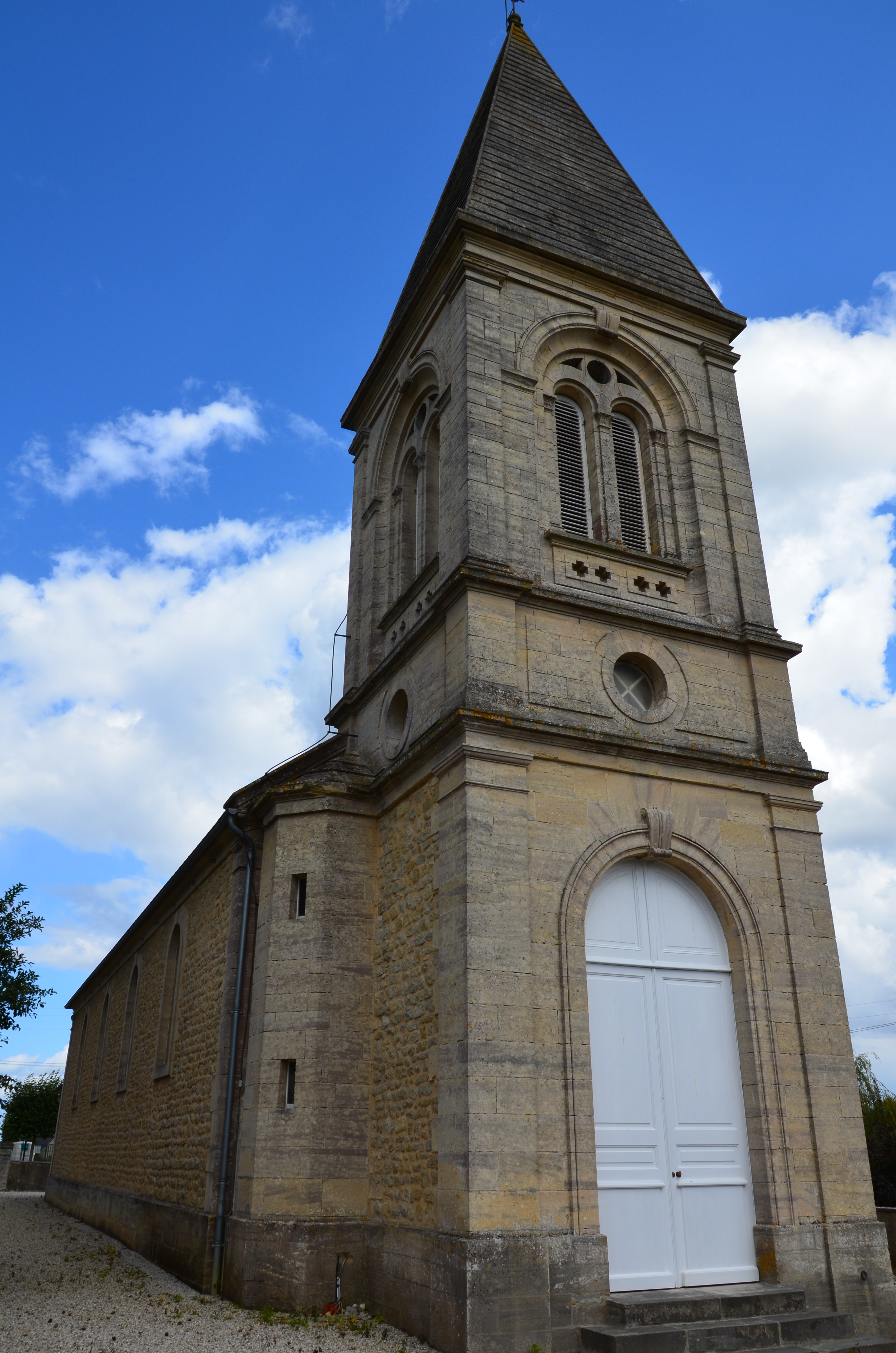 Église Saint-Vigor d'Agy.